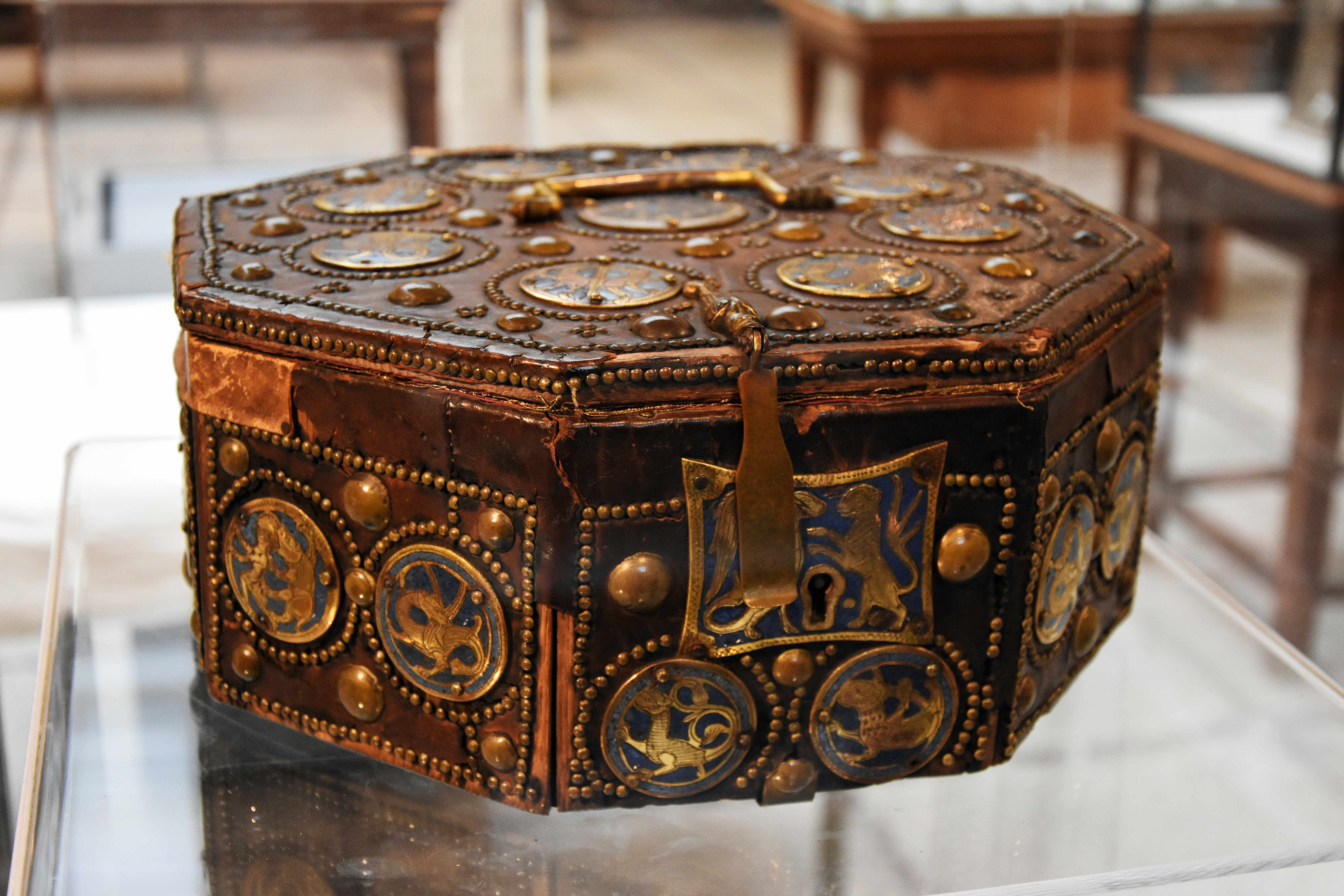 Kroonfoedraal van de Kroon van Namen, Parijs na 1206, 13 eeuw - koper, leder, email van Limoges - Beschermde kunstschatten kathedraal Namen